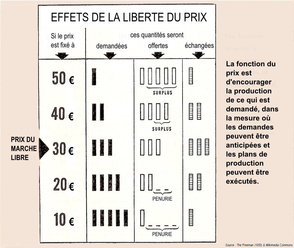 A diagram presenting the argument for free prices, translated in French. Un diagramme présentant l'argument pour des prix libres, traduit en français.